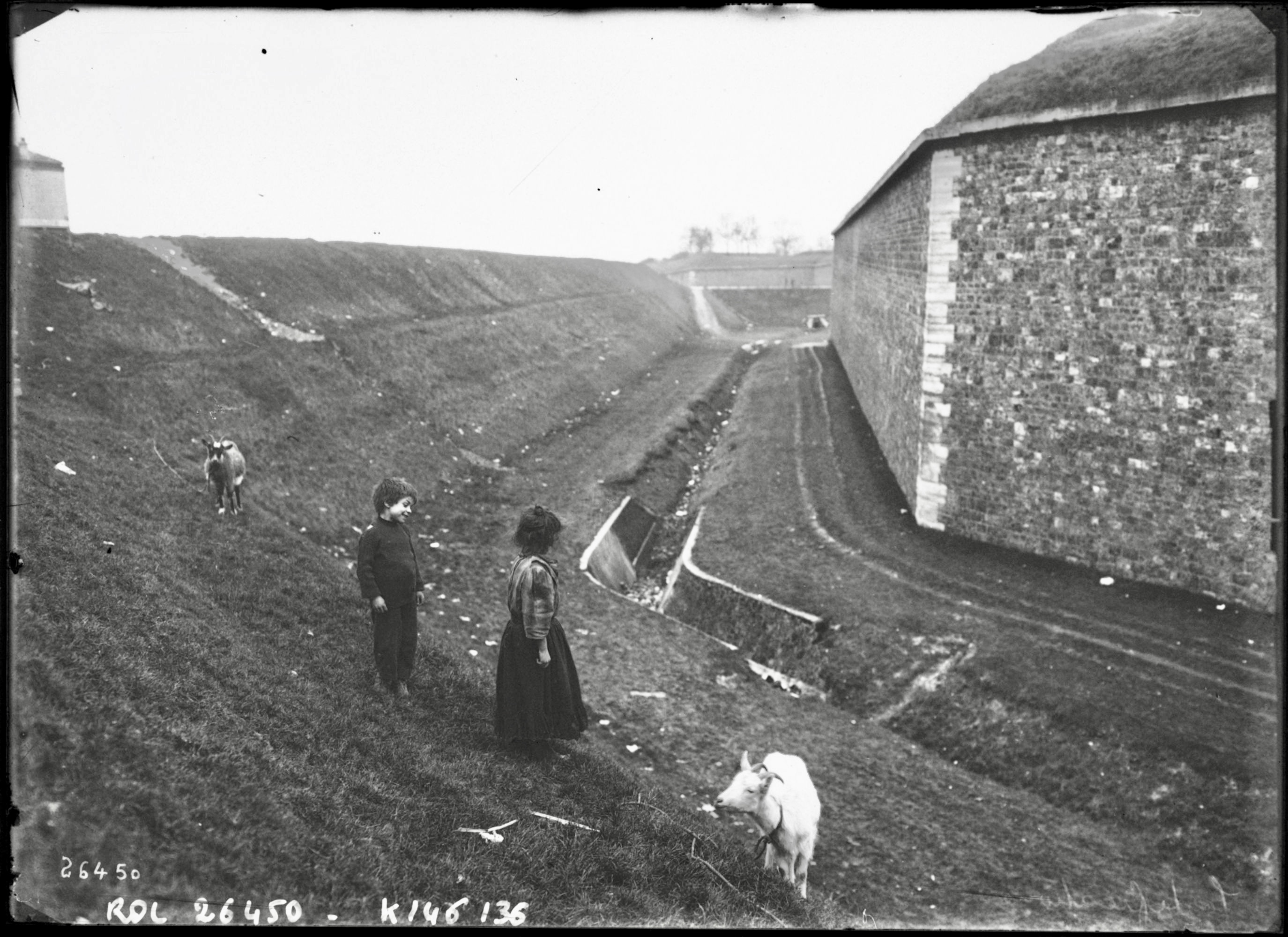 L'enceinte de Thiers (Paris): la muraille, le fossé, le talus de défense, et des petits zonards faisant paître leurs chèvres